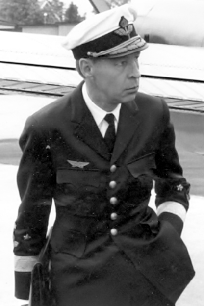 Lars-Erik Englund, chef för Flygvapnet 1988-1994